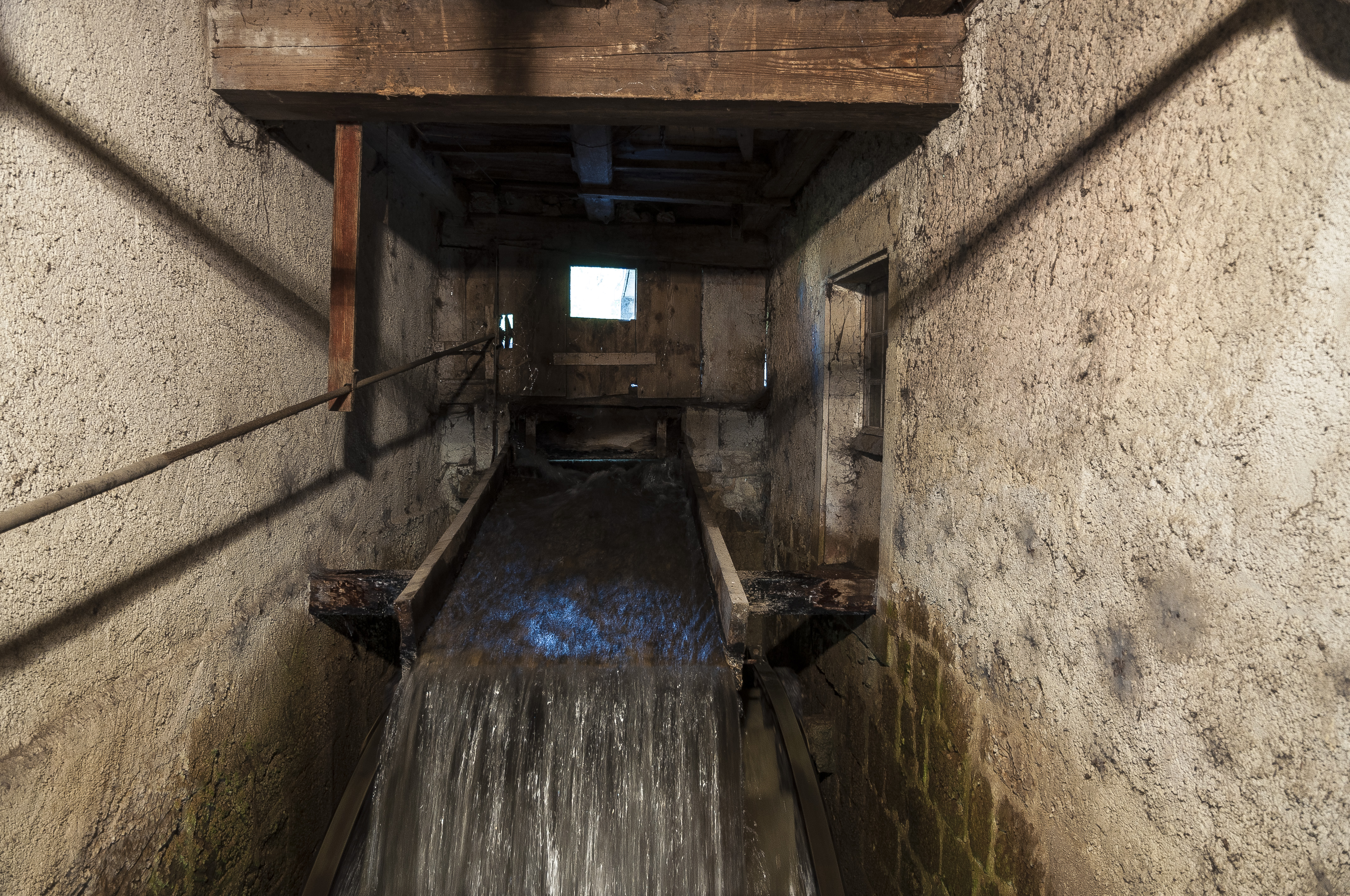 Le moulin de Courtelevant est un moulin à eau alimenté par la Vendeline.